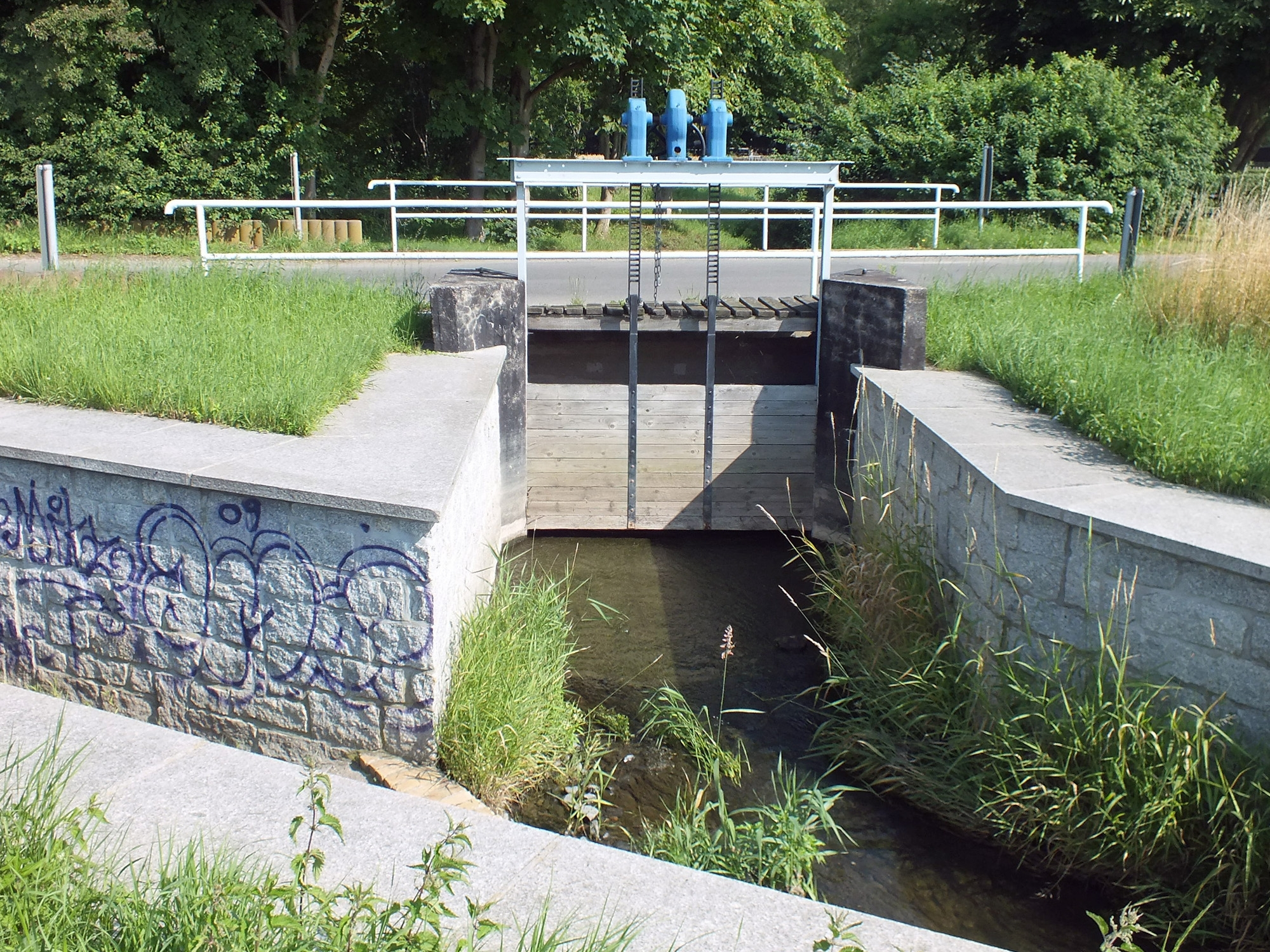 Der Pösgraben in Kleinpösna am Hochwasserwehr